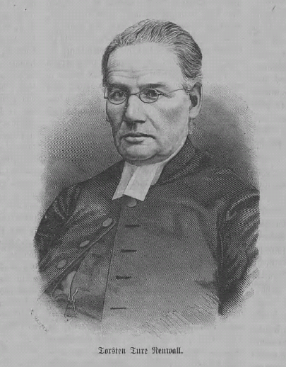 Torsten Thure Renvall, toimi Turun arkkipiispana vuosina 1884–1898